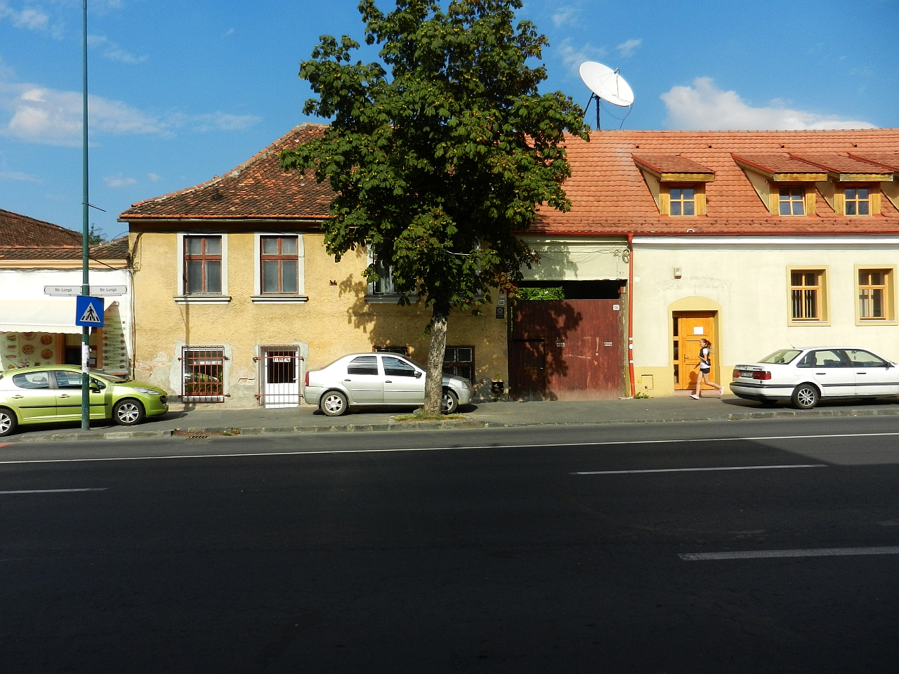 Casa monument istoric (Lunga 134-136)